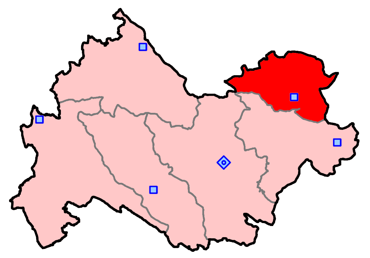 حوزه‌ سنقر برای انتخابات مجلس شورای اسلامی